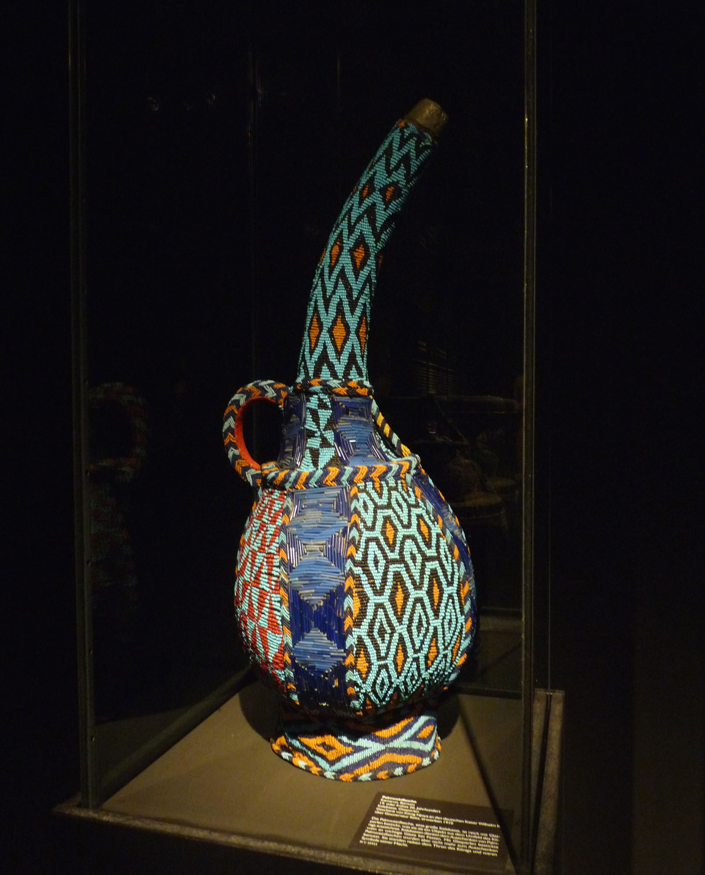 Bouteille de vin de palme Bamum offerte par le roi Njoya à l'empereur Guillaume II, par l'intermédiaire du gouverneur Seitz. Calebasse, perles de verre. 19e ou début du 20e siècle (Musée ethnologique de Berlin)